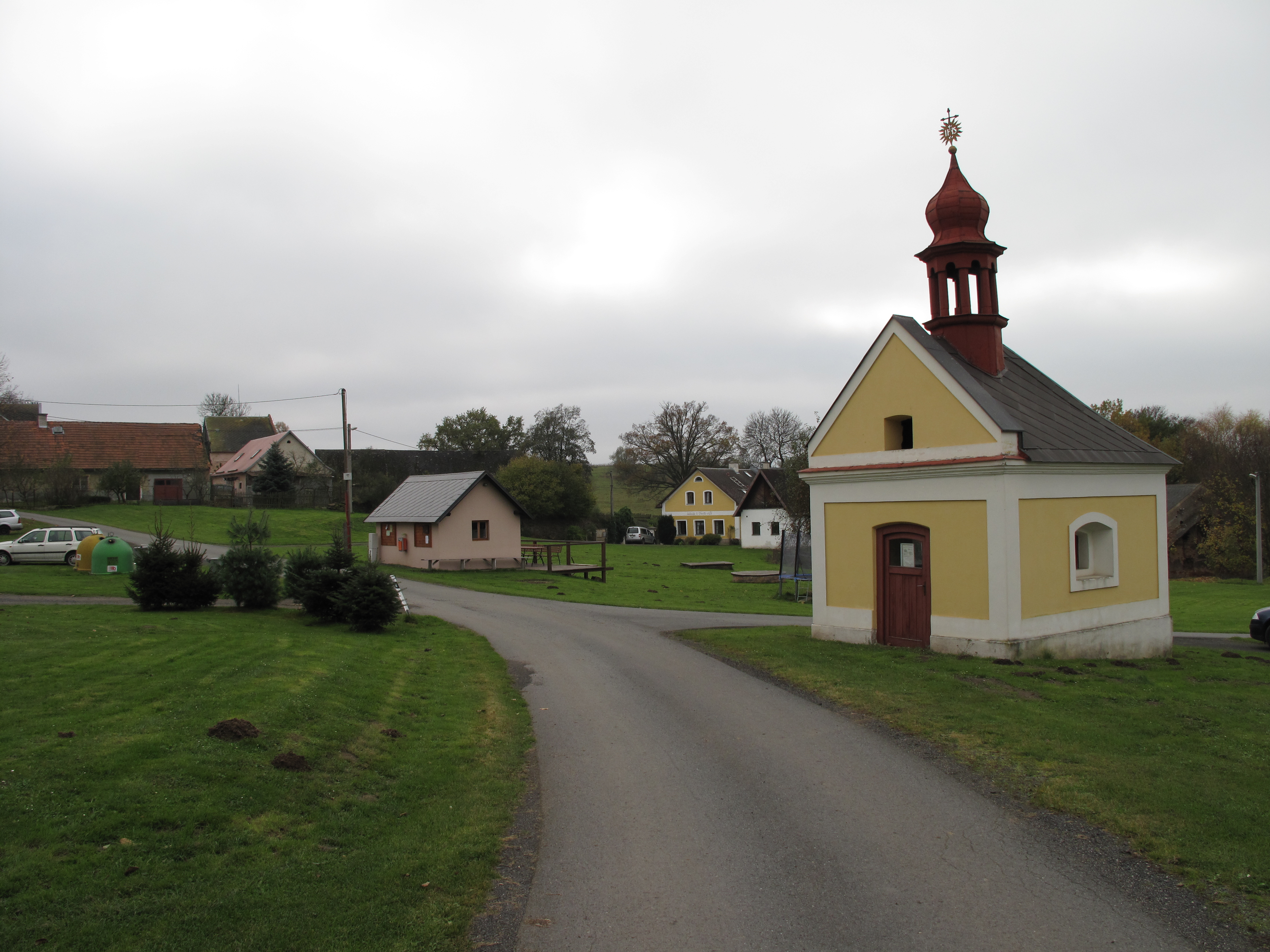 Kaplička v Semtěši. Okres Karovy Vary, Česká republika.